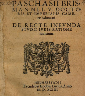 De recte ineunda studii juris ratione iudicium. - Helmaestadii, Jacobus ..., 1593, Jacobus Lucius der Ältere (1530-1597)